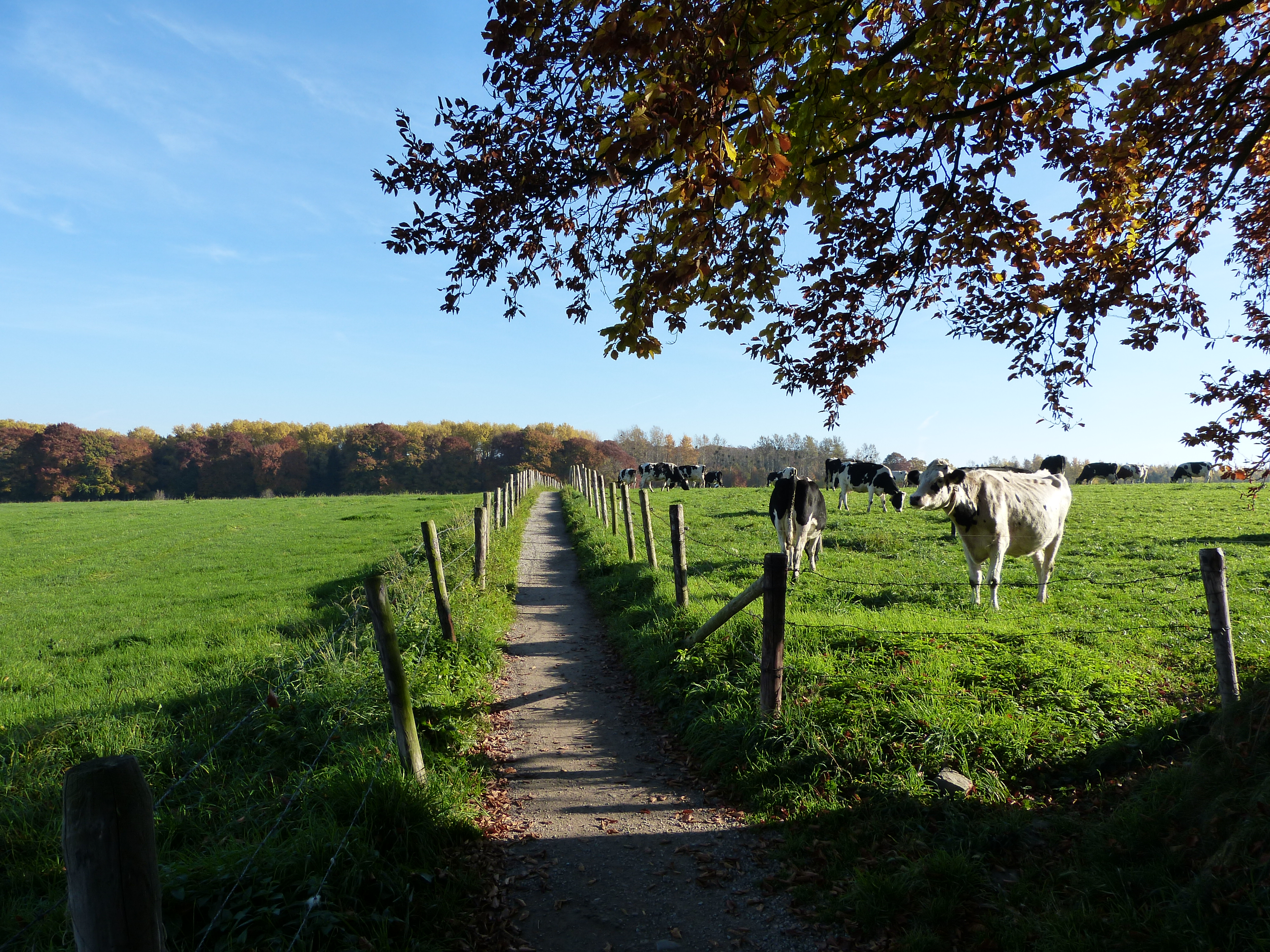 ehemaliger Versorgungspfad der Burg Frankenberg in Aachen